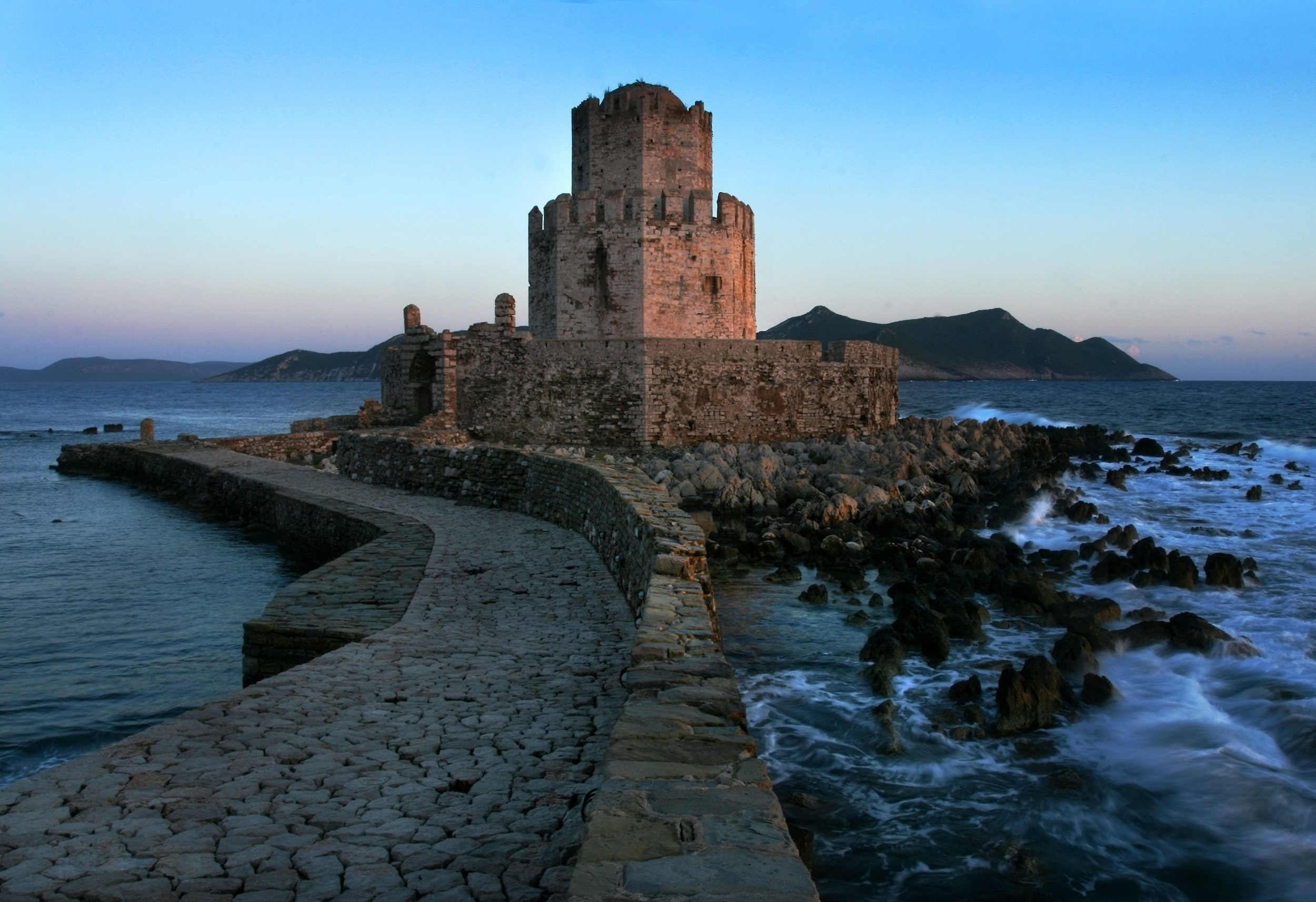 Κάστρο Μεθώνης«Κάστρο Μεθώνης»